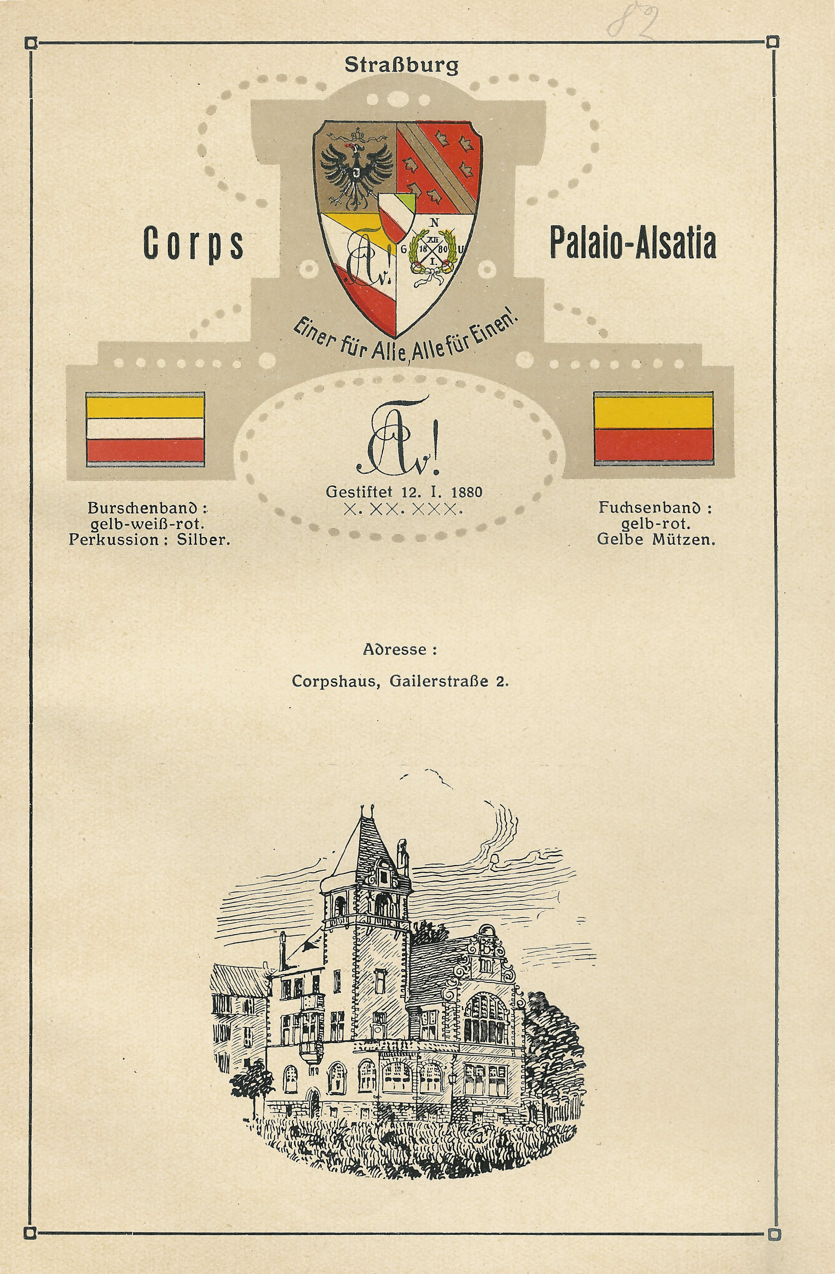 Studentenwappen, Zirkel, Couleur und Corpshaus der Palaio-Alsatia zu Straßburg